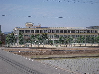 Template:久谷中学校本館(この建物は新築時と同じもの)